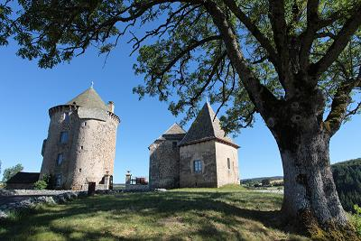 Restaurant gastronomique de Serge Vieira, 1 étoile au Michelin et Bocuse d'or en 2005